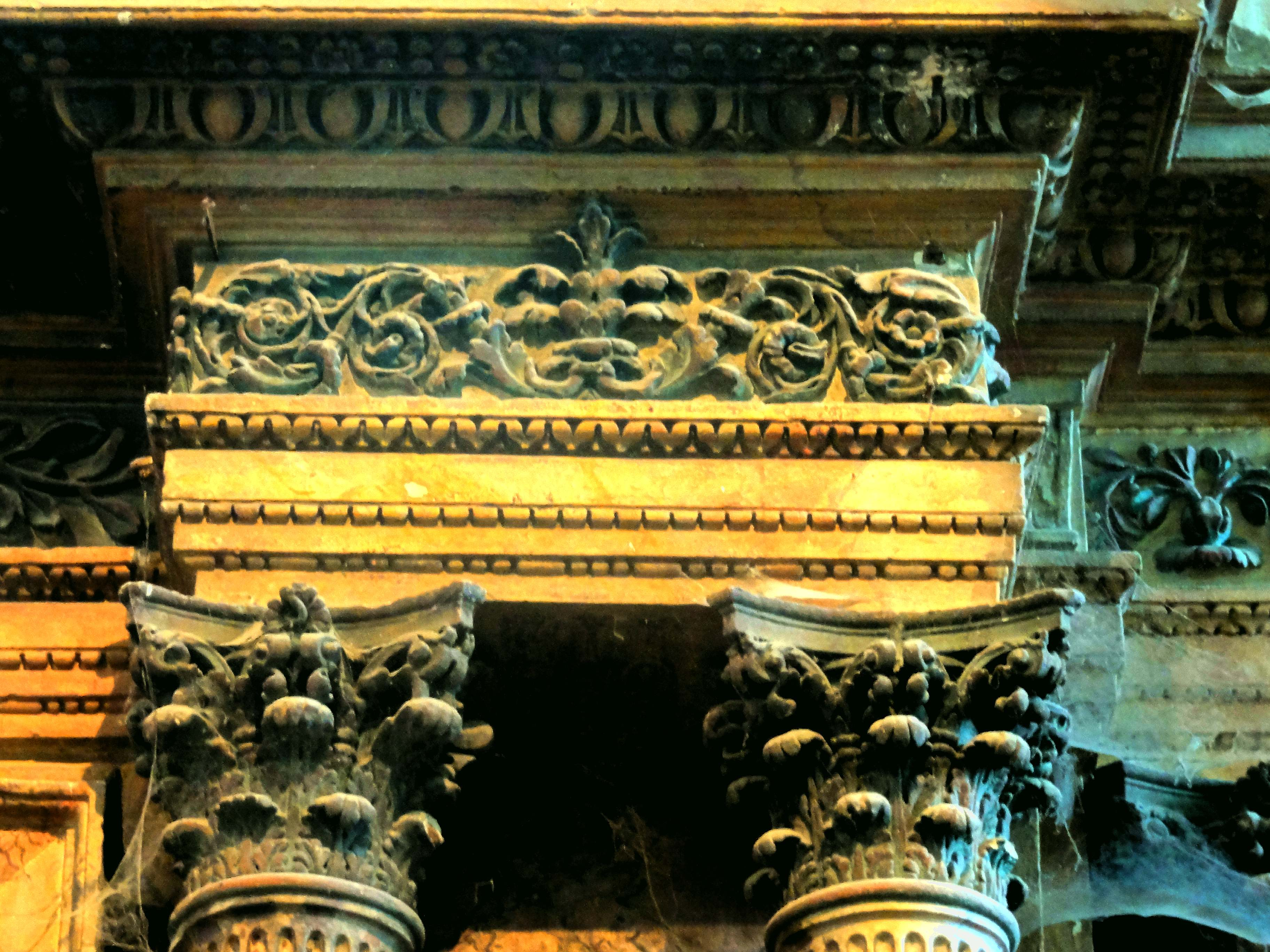 Retable majeur, entablement et chapiteaux.